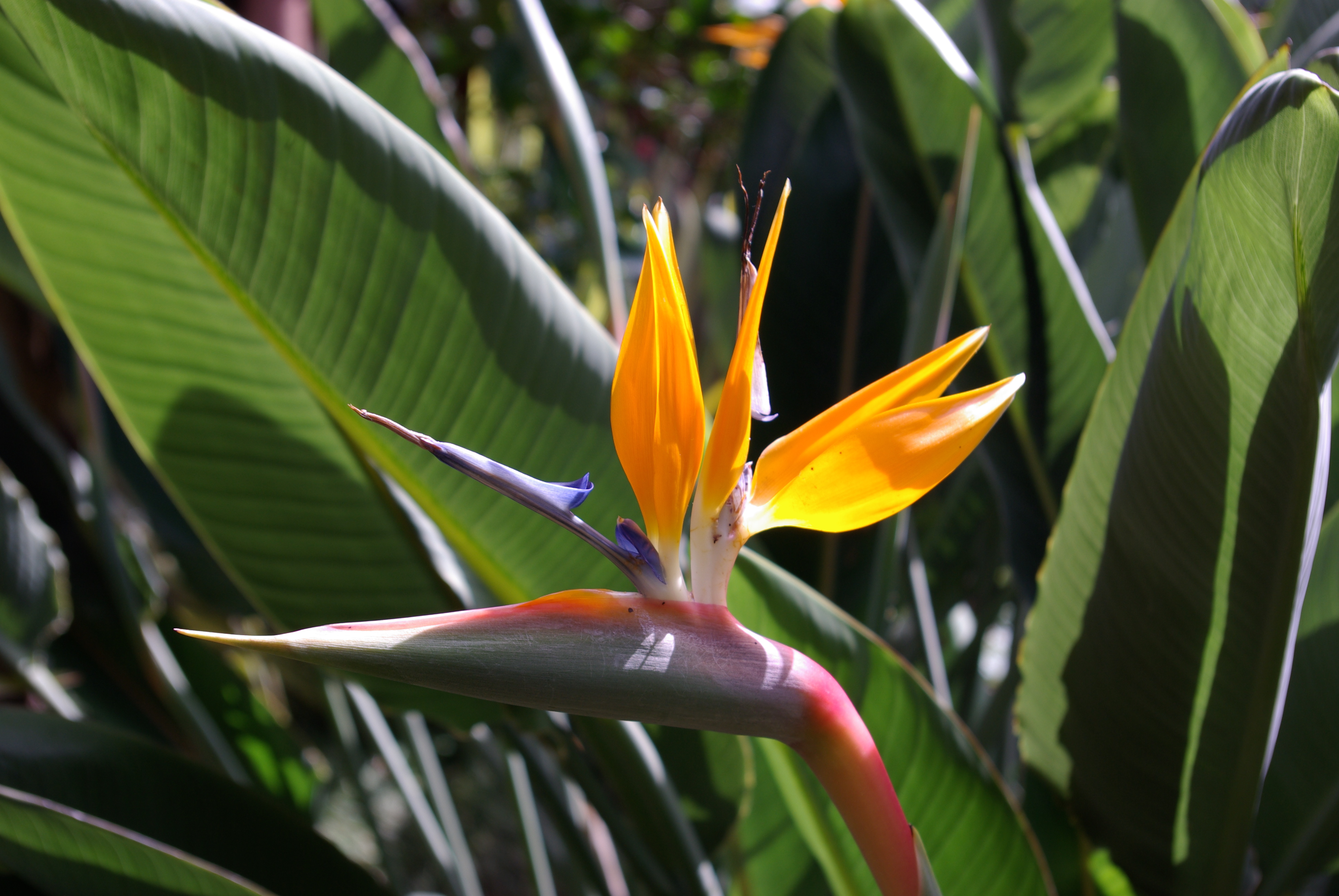 Strelitzia reginae